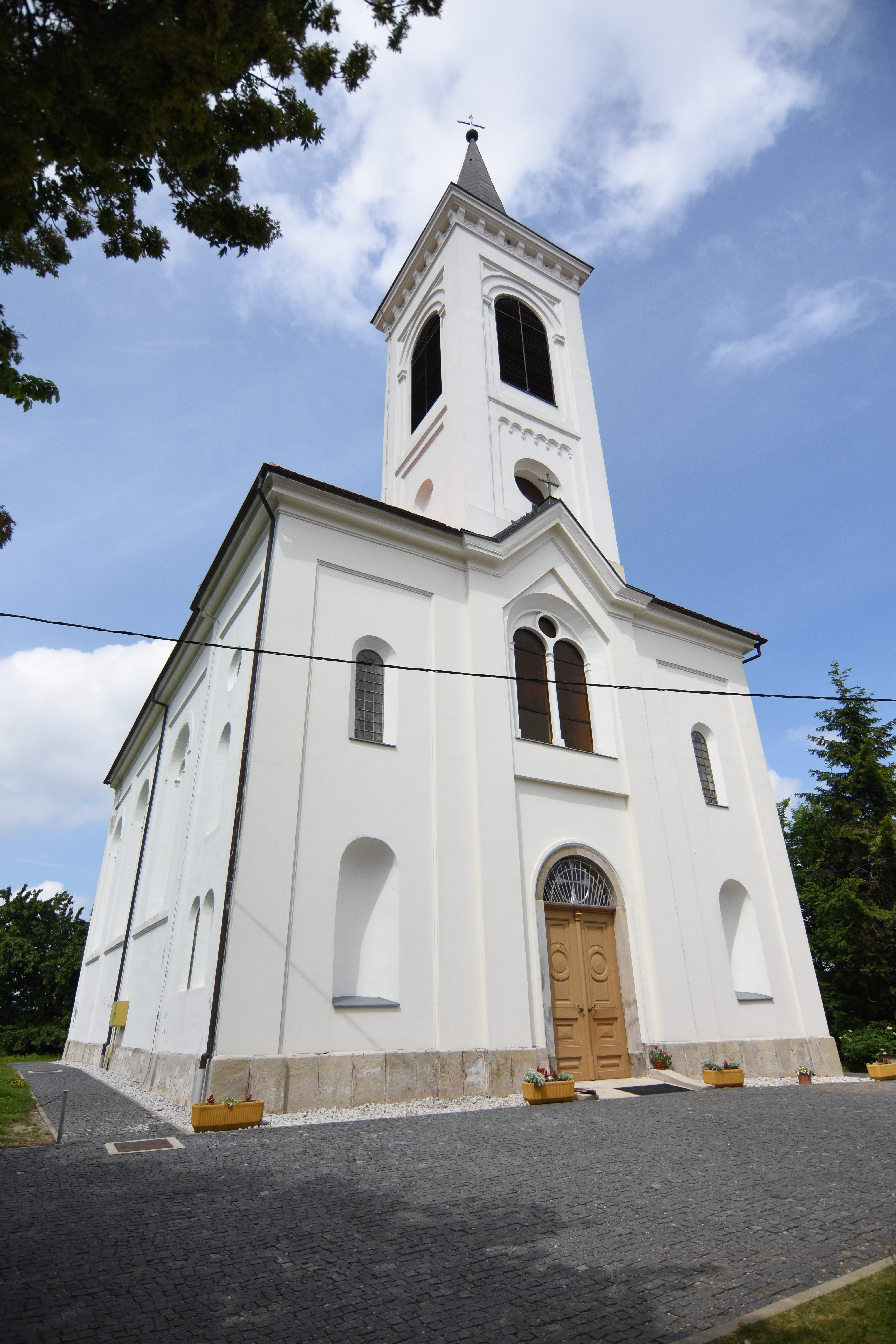 Gornje Jesenje (Krapinsko-zagorska županija)